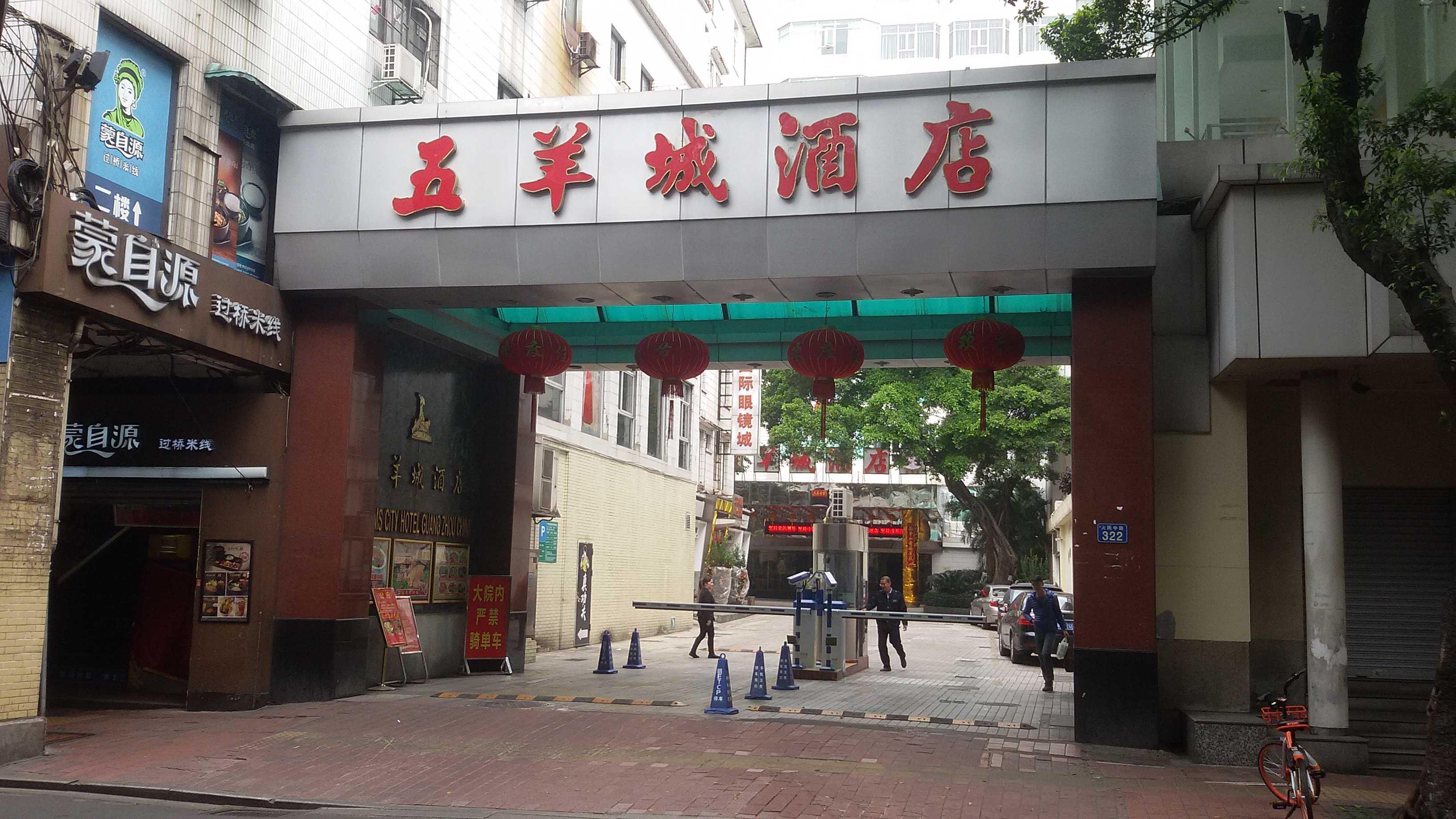 粵語: 五羊城酒店